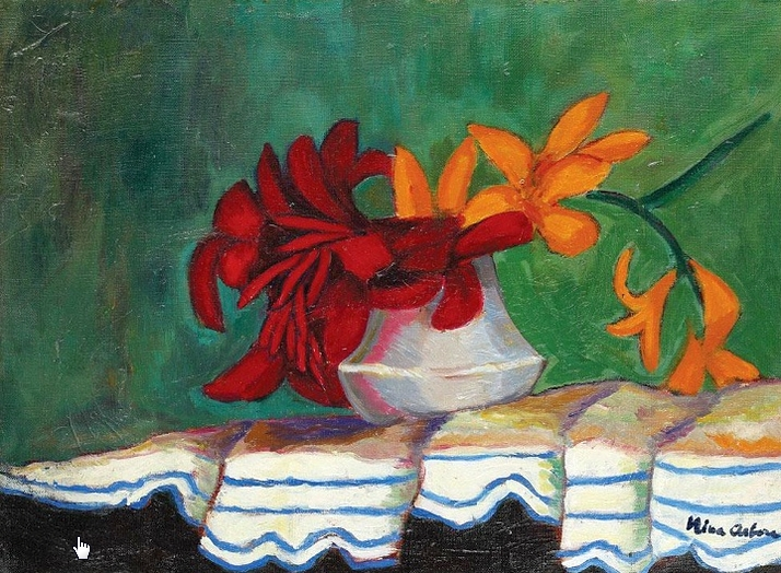 "Vas cu crini", realizat de Nina Arbore